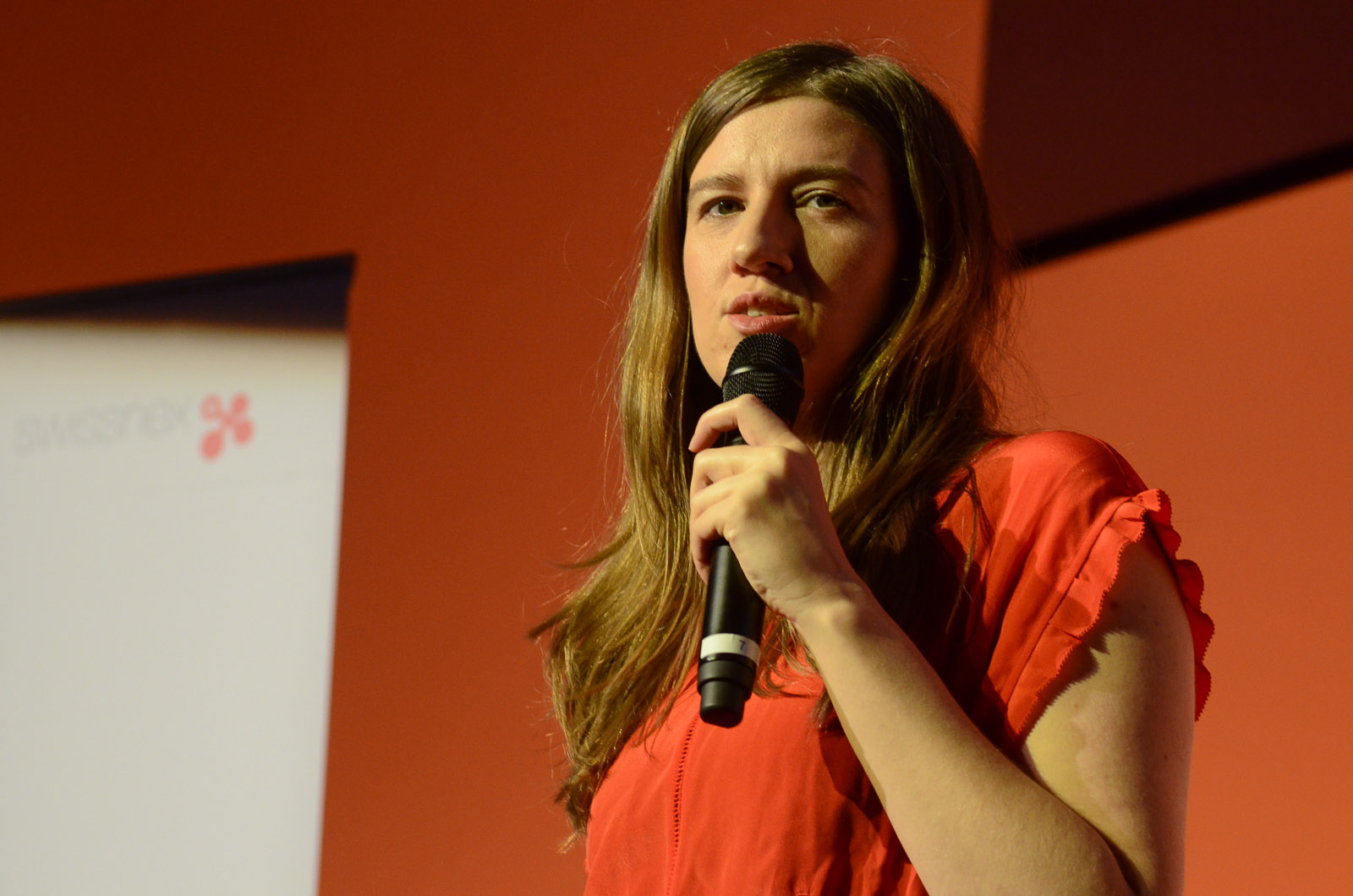 Joanne McNeil